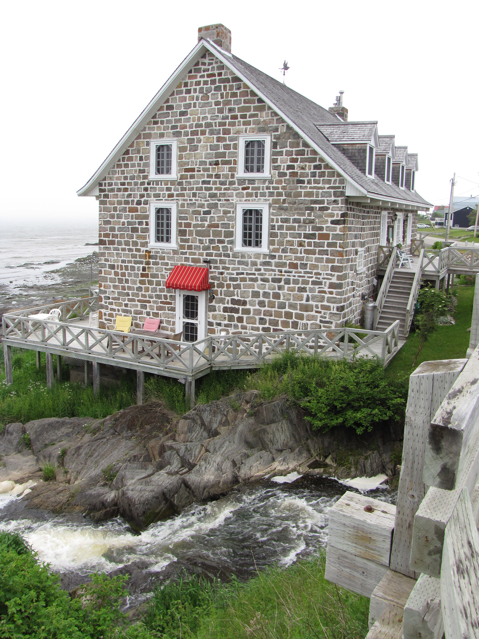 Moulin banal du ruisseau à la Loutre, situé à Sainte-Luce (Bas-Saint-Laurent, Québec). Tous les mécanismes ont été défaits pour y aménager une résidence. Actuellement, il sert de centre de formation et de gîte touristique. Moulin à eau; moulin à farine.